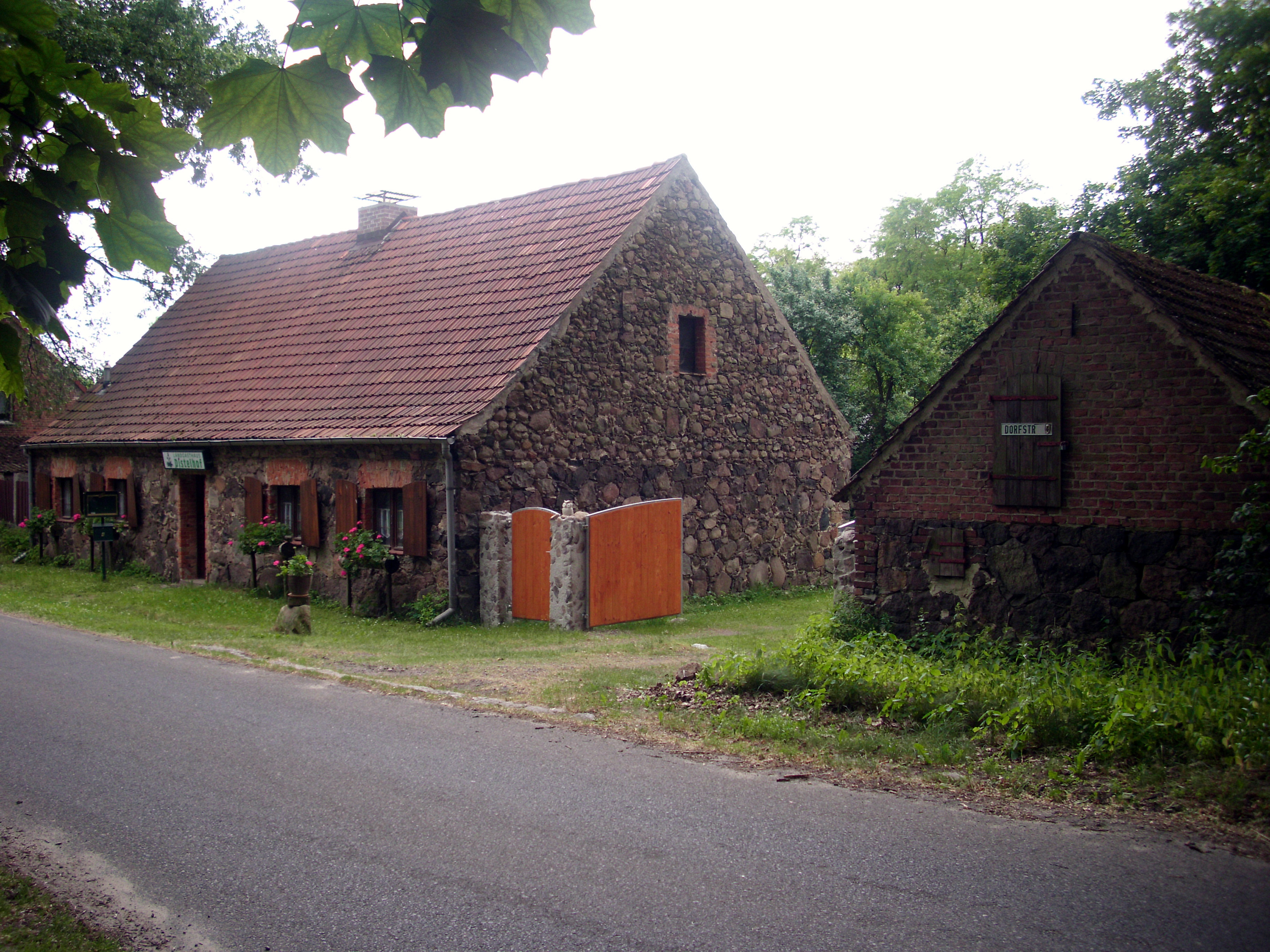 15299 Dubrow, Dorfstraße